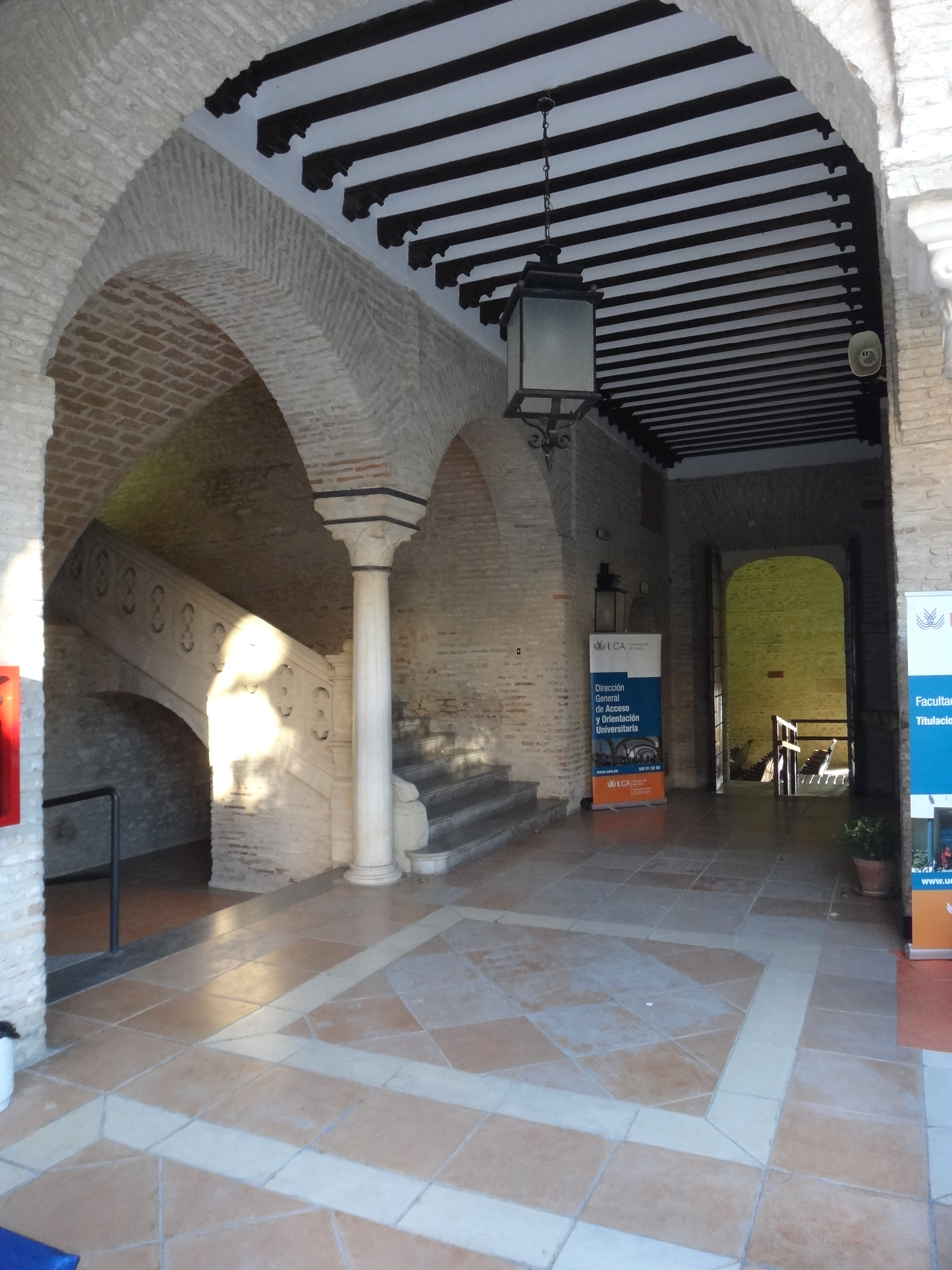 IES El Convento (Bornos)